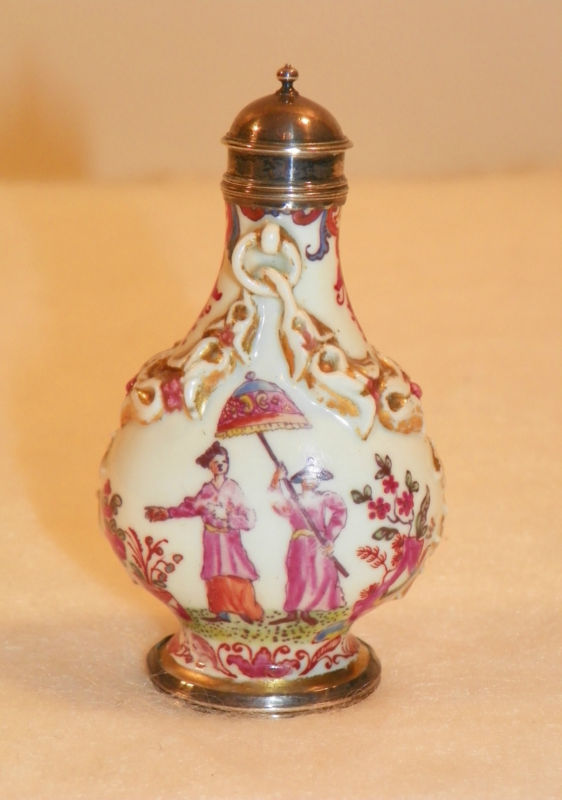 Published in J. F. Hayward, Viennese Porcelain of the Du Paquier Period - London, 1952 - pl. 49a. Hans Backer Collection, Londra.